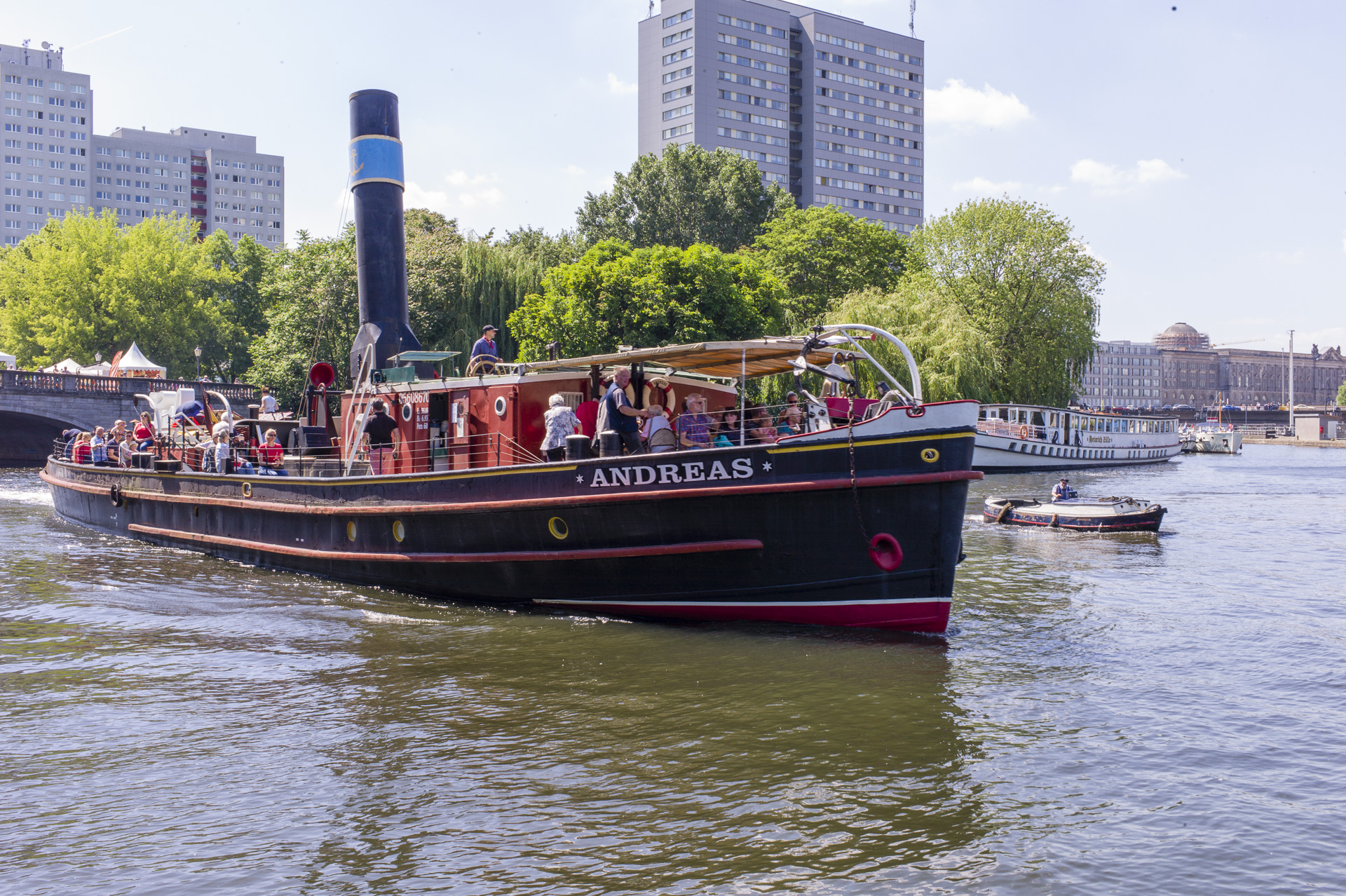 Dampfschleppschiff ANDREAS in Fahrt